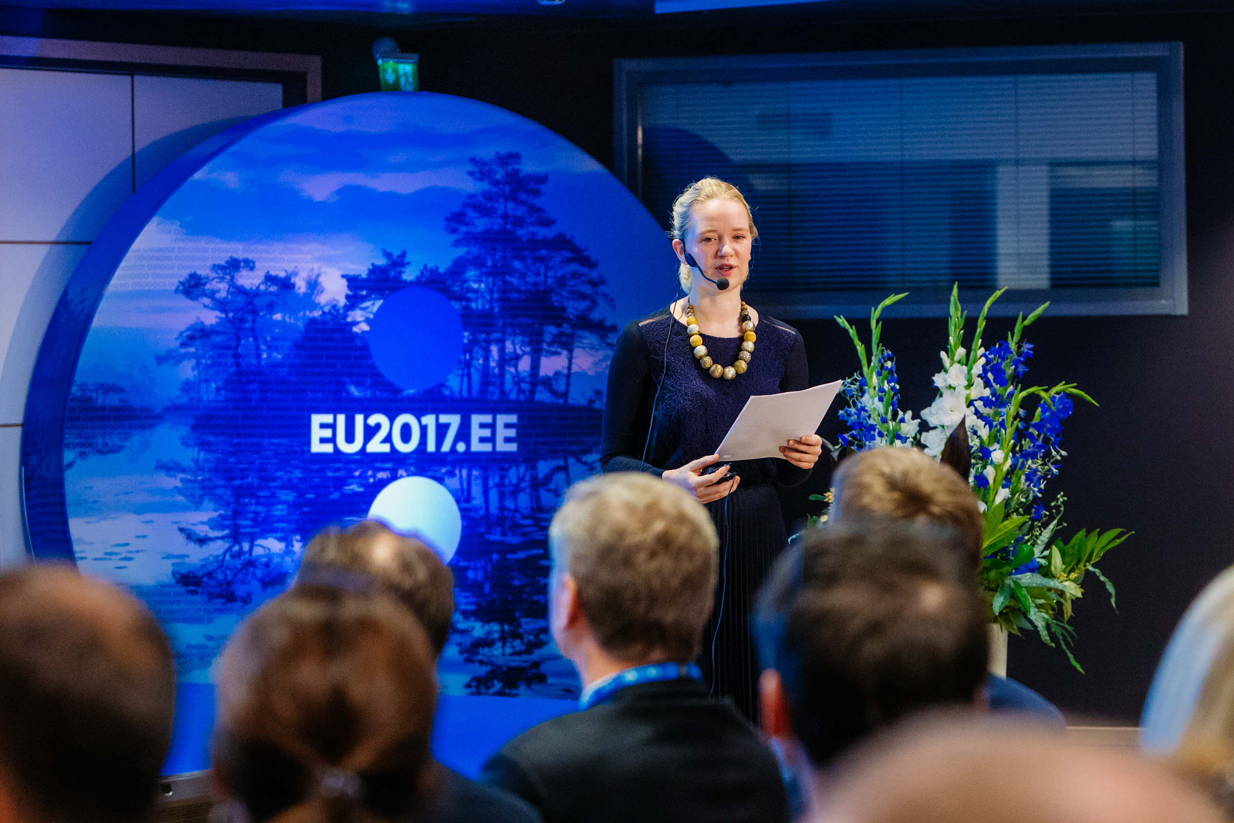 Photo: Arno Mikkor (EU2017EE)